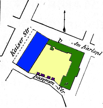 Grundriss der Karlskaserne um 1898 Alte Karlskaserne Neue Karlskaserne mit Hauptgebäude (a) und nördlichem Zwischenbau (b) Pissoirs und Abtritte für Mannschaften und Unteroffiziere